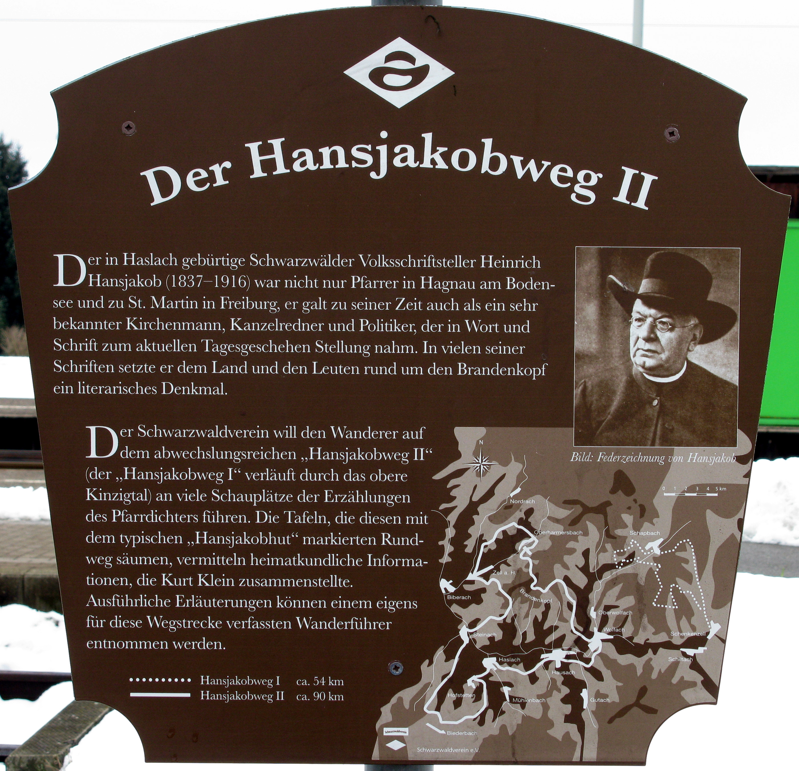 Hinweisschild zum Hansjakobweg II in Biberach (Baden)